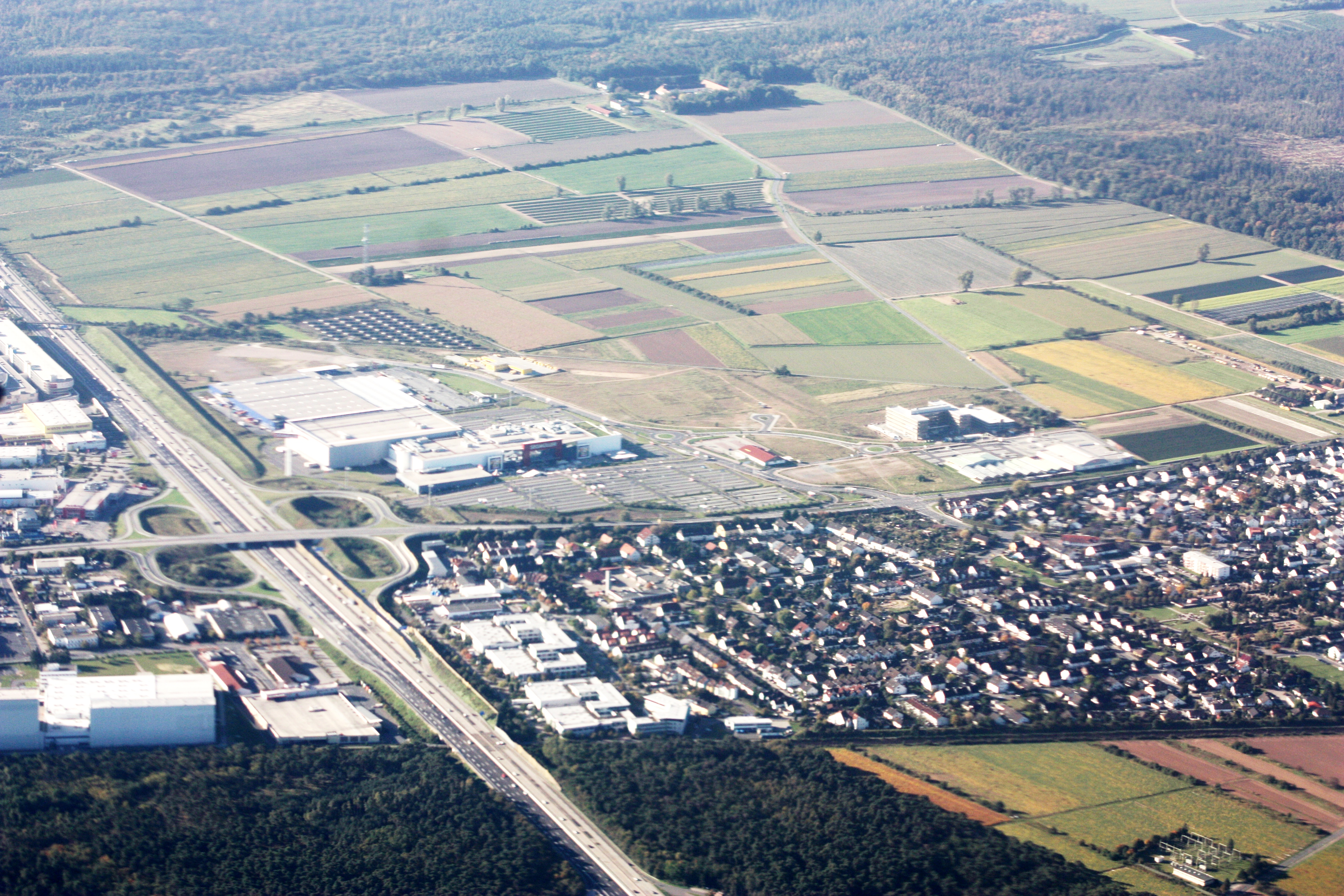 1 Flug von Frankfurt/Main nach Sofia; Start 10:12 MEZ; Landung 13:06 MEZ; Oktober 2010; A5; B42; Weiterstadt